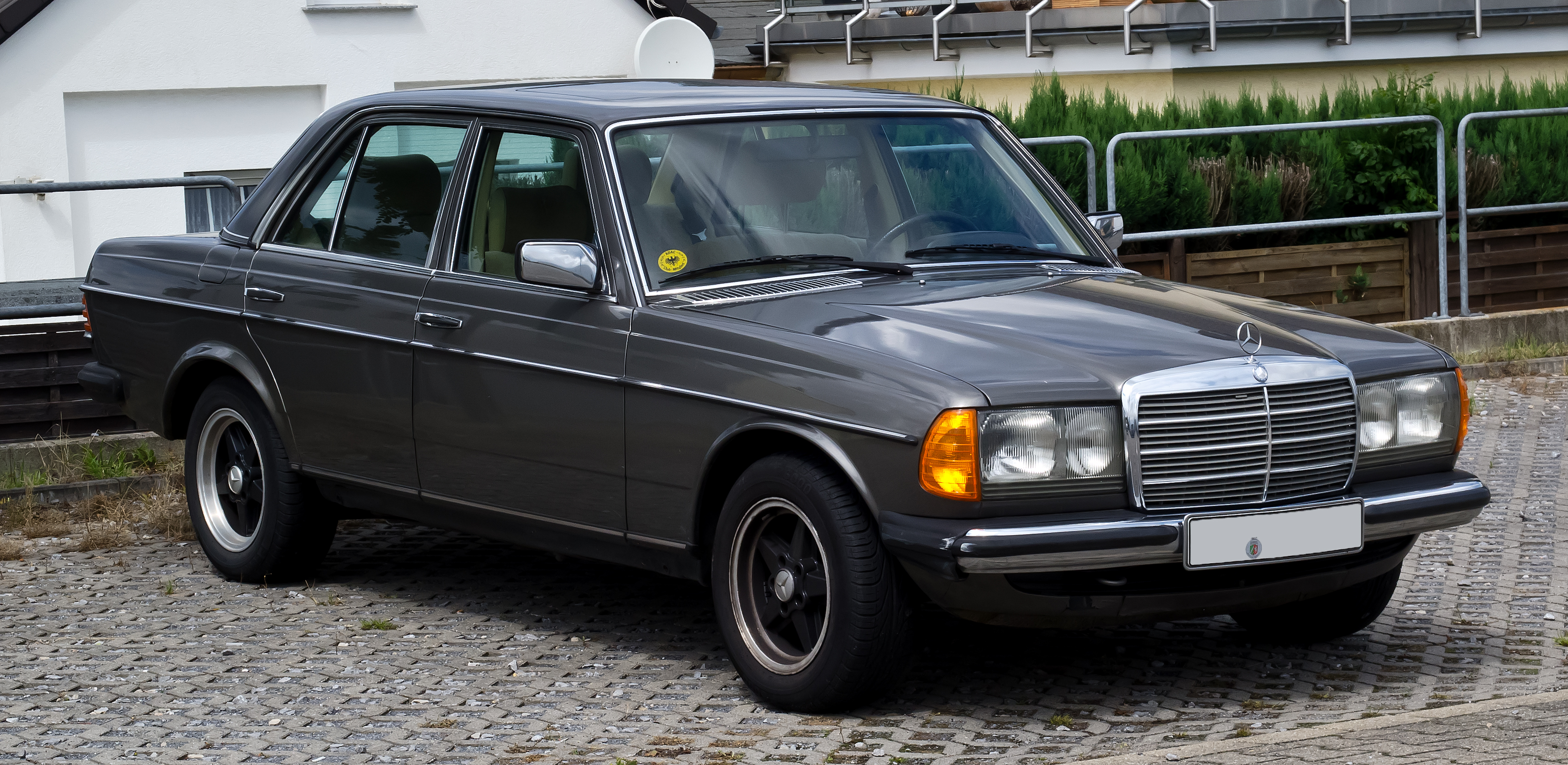 Mercedes-Benz 280 E (W 123, Facelift)